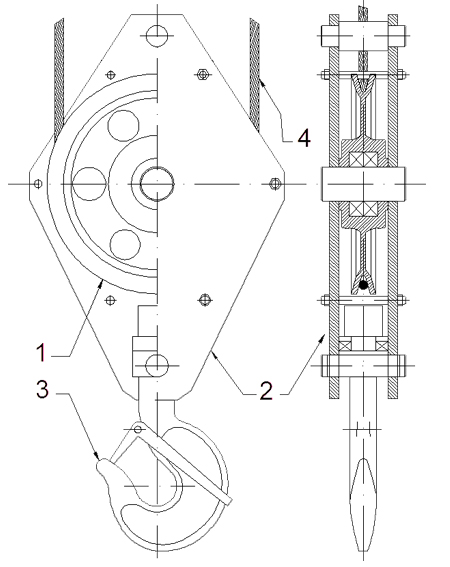 Schemat zblocza